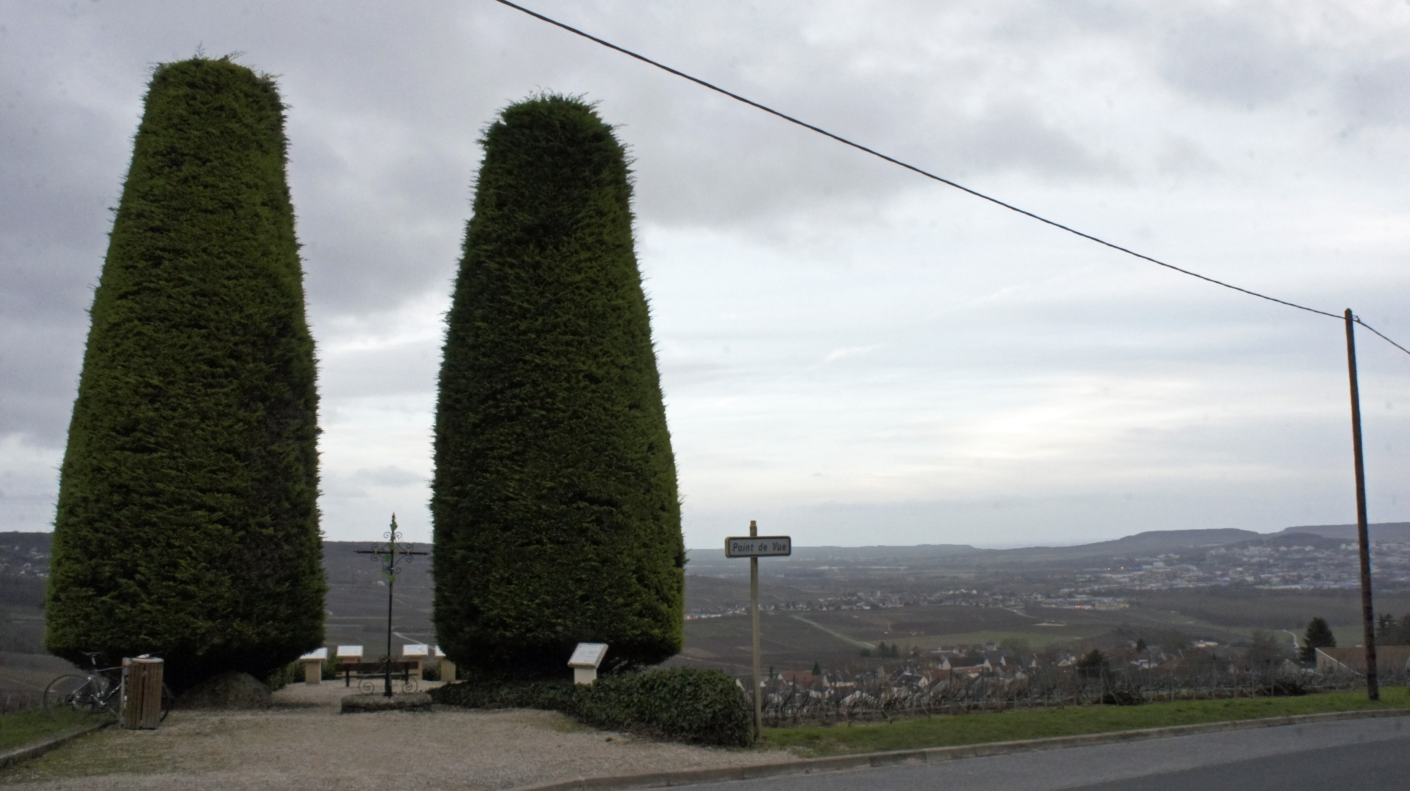 Croix du Point de vue Hauvillers vers Epernay.